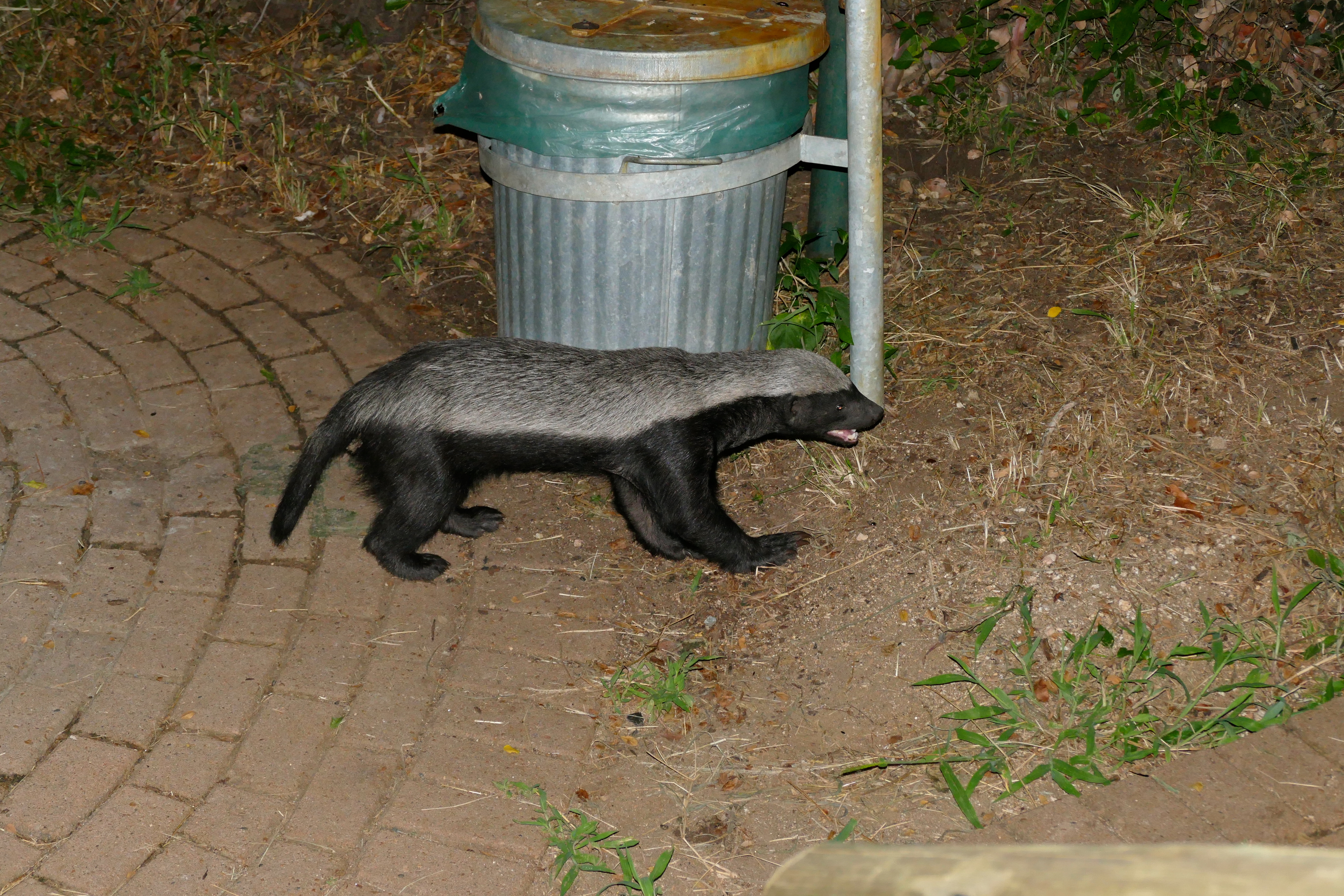 Tamboti Camp, Kruger NP, SOUTH AFRICA